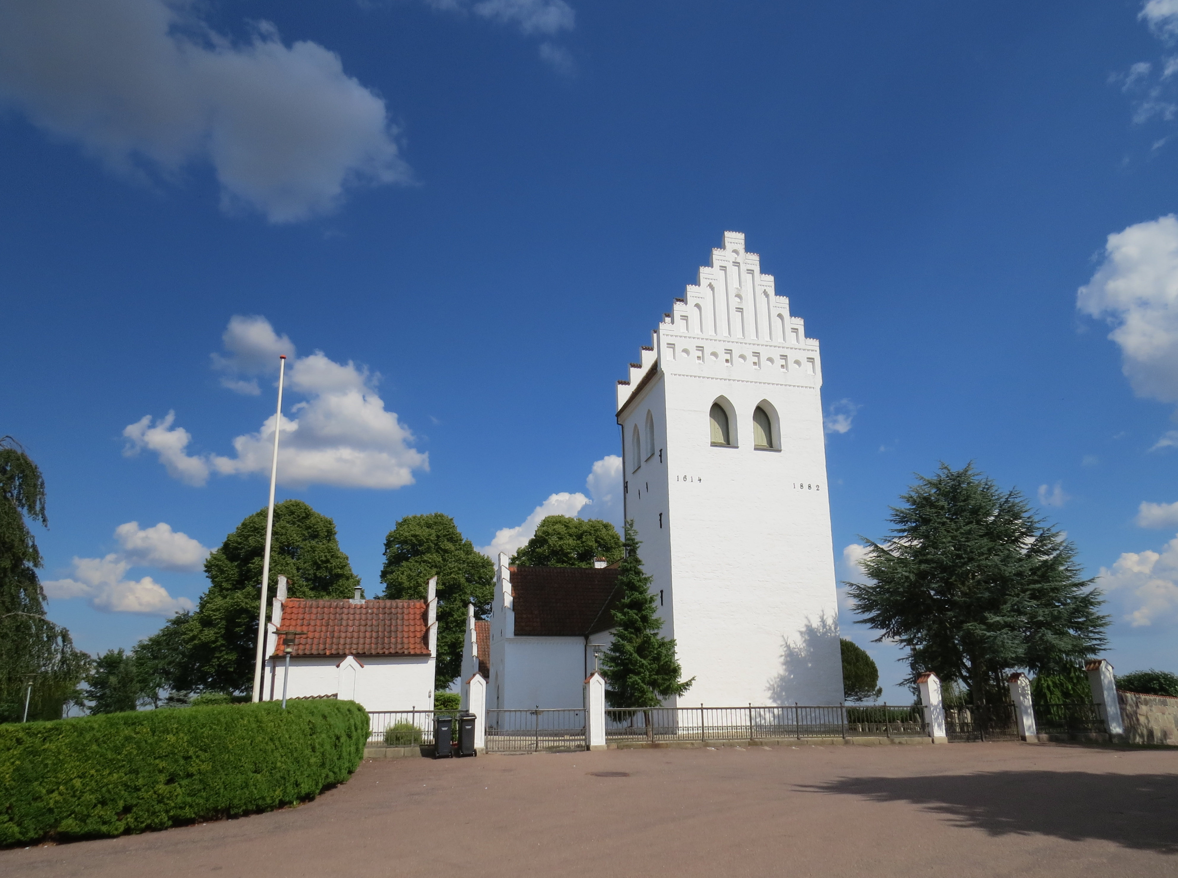 Krogstrup Kirke, Krogstrup, tidligere Hornsherred, Sjælland